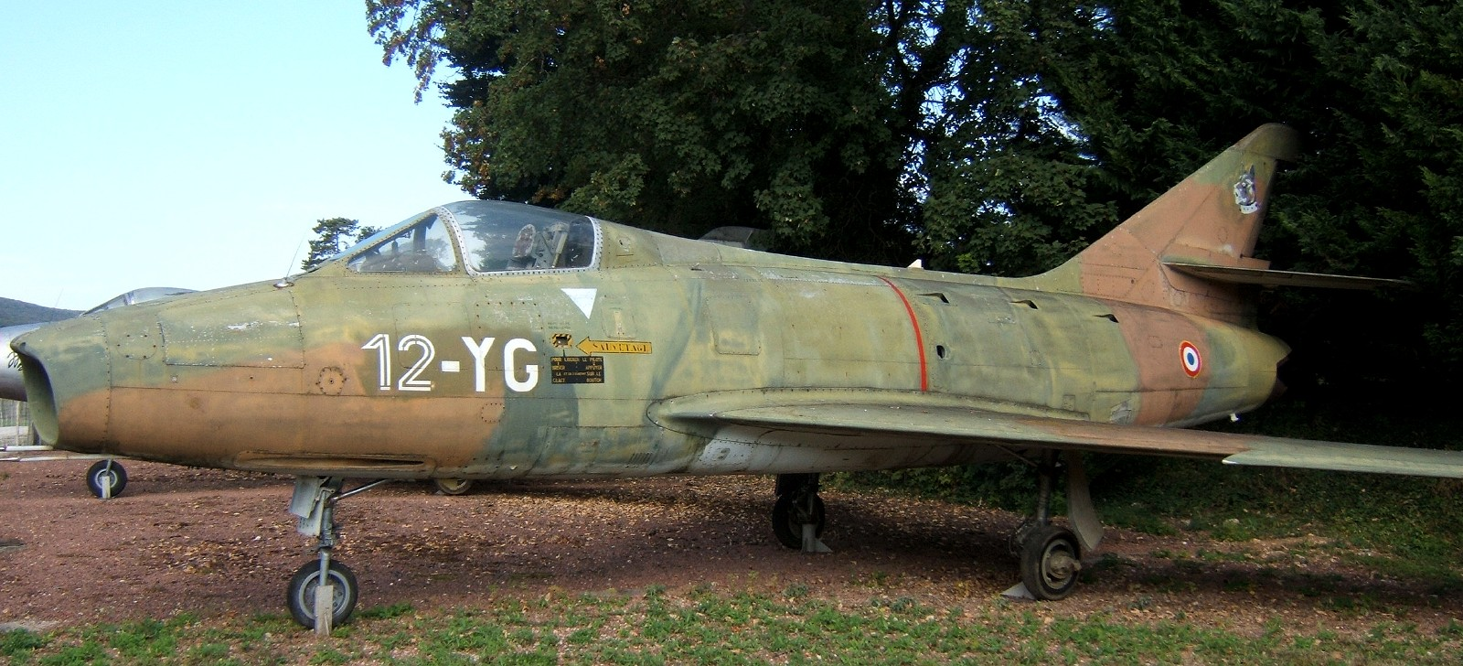 Super Mystère B2 conservé au musée du château de Savigny-les-Beaunes